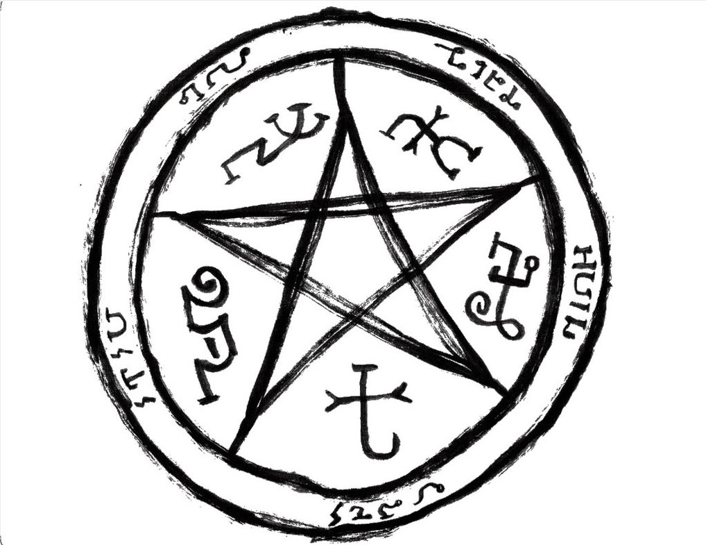 questo penracolo su usa per le evocazioni e si costringe il demone nel cerchio.